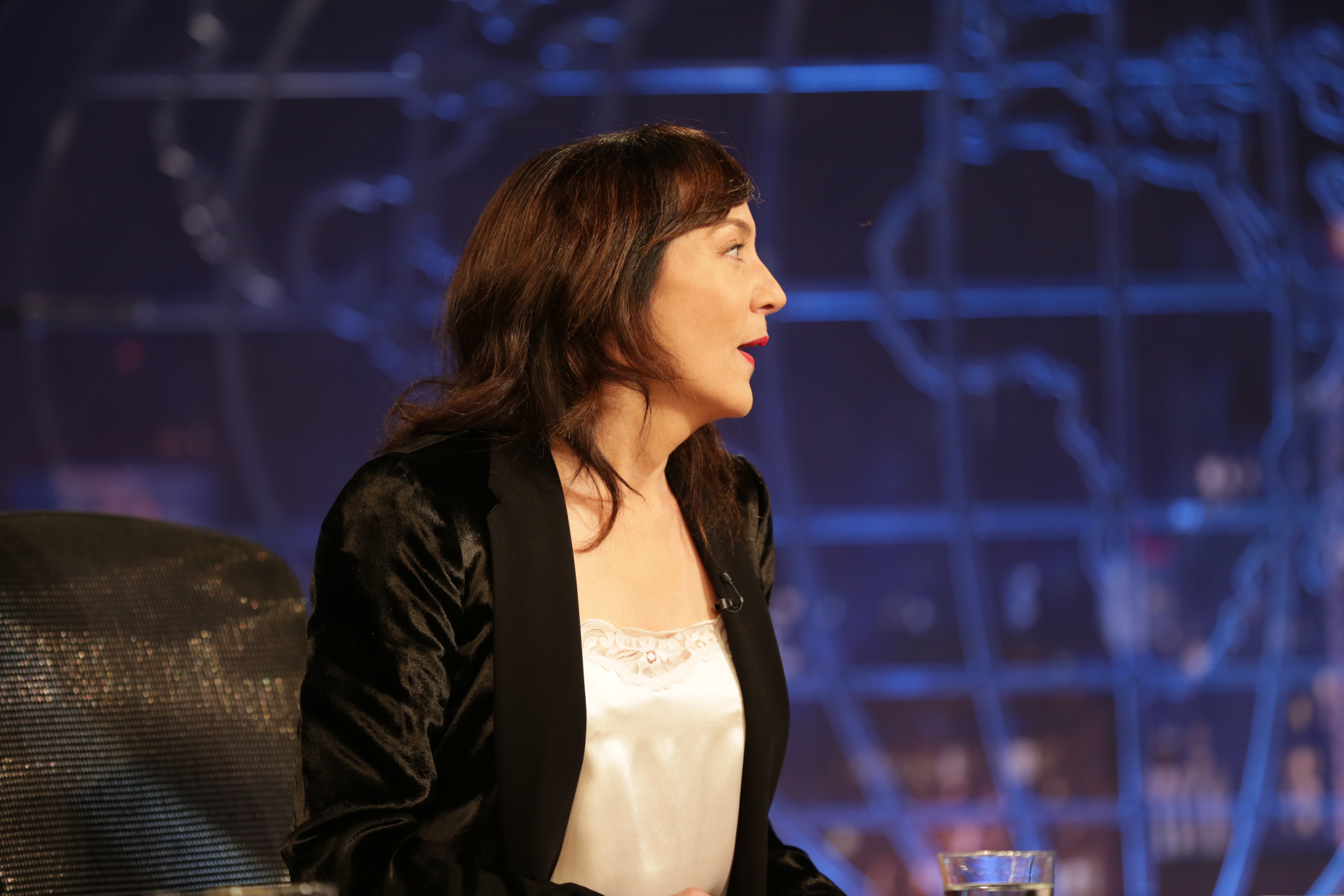 עינב גלילי בגב האומה